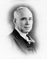 Edmond Archambault (1872 - 1947), fondateur de Archambault Musique